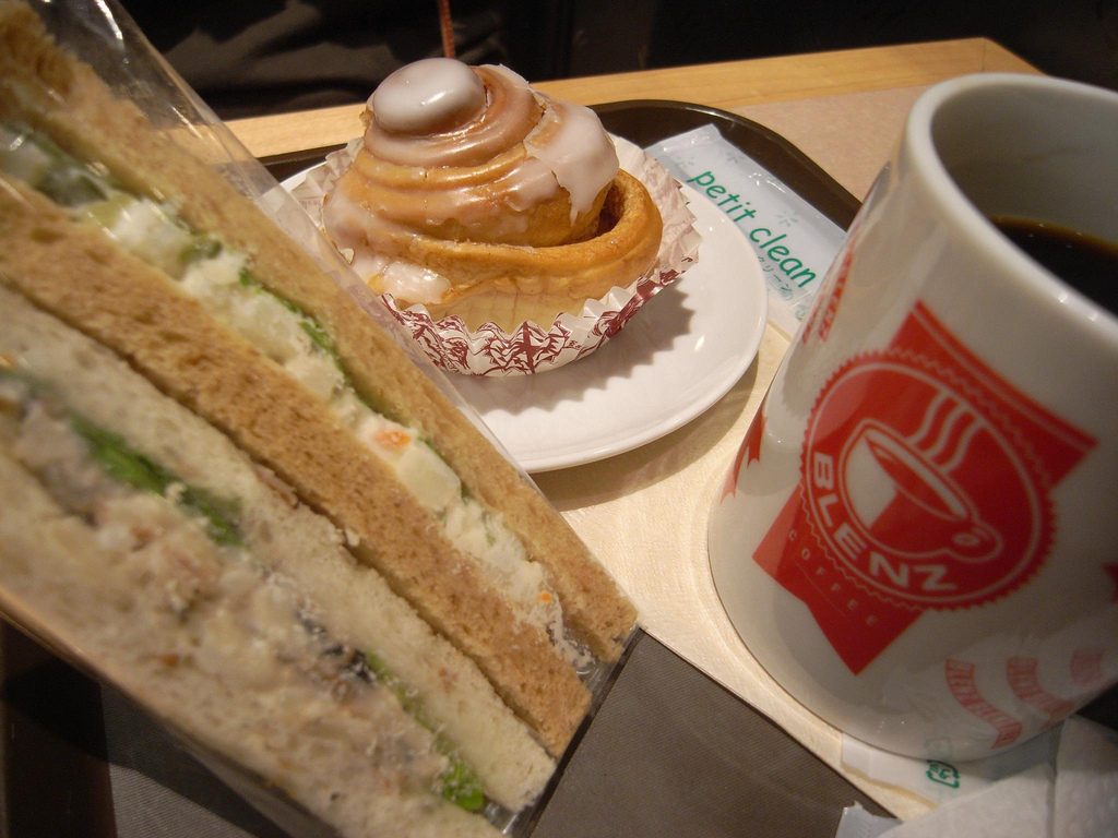 Blenz Coffee shop at lazona, Kawasaki, Kanagawa, Japan.